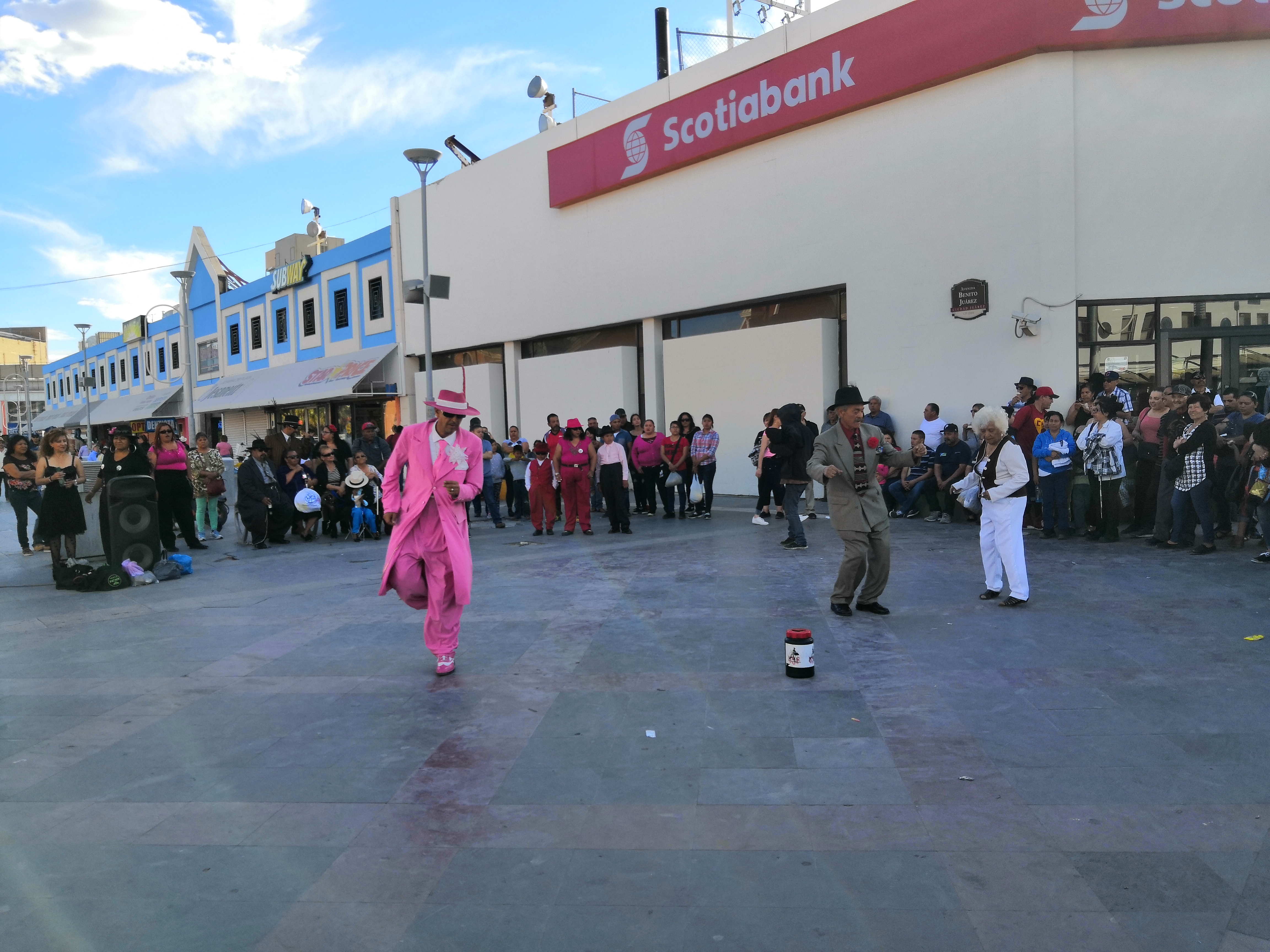 Pachucos